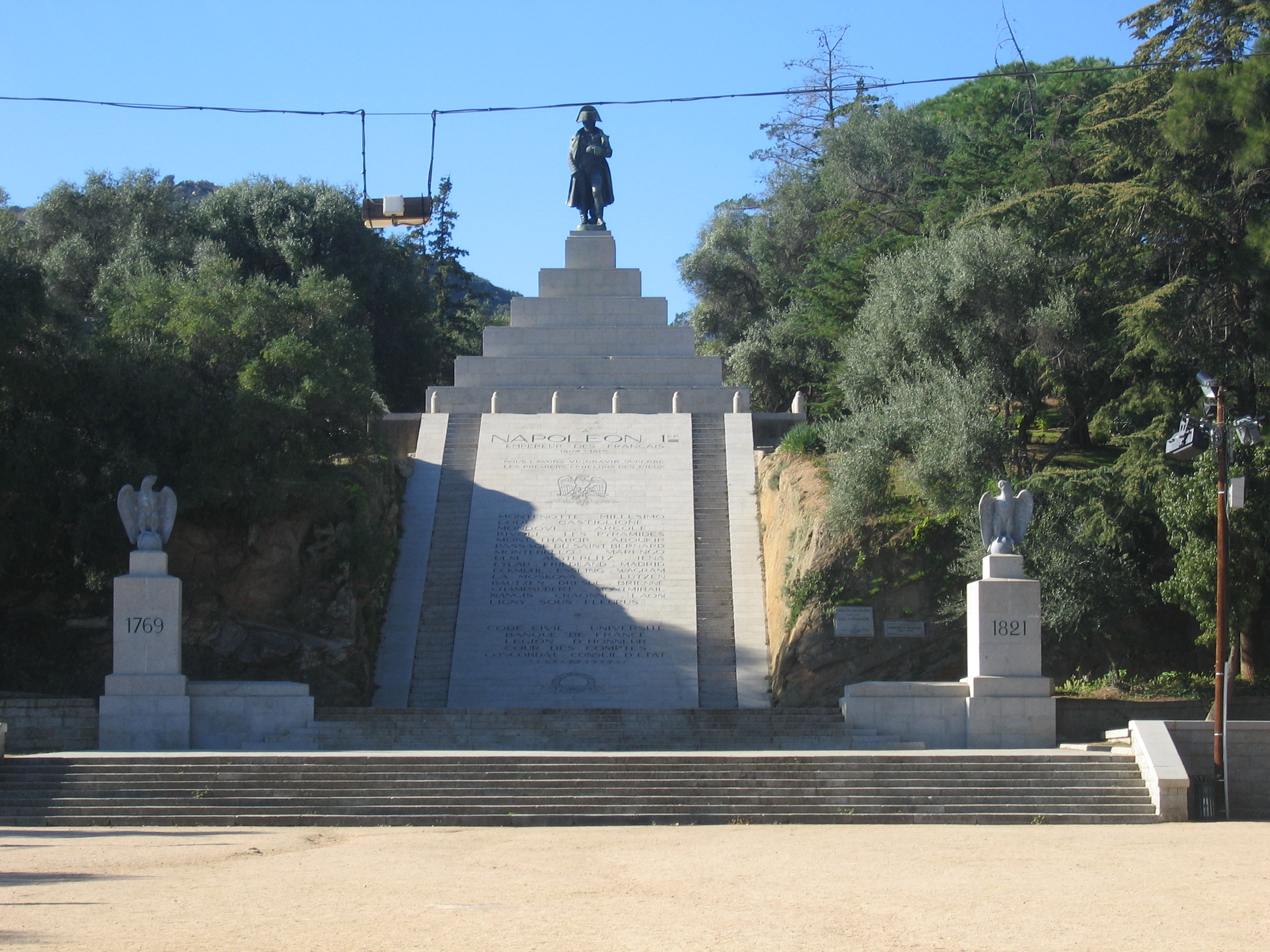 Ajaccio